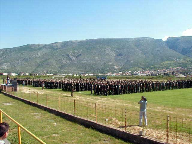 Postrojenje postrojbi HVO-a 11.5.2001. U Rodocu, predgradju Mostara